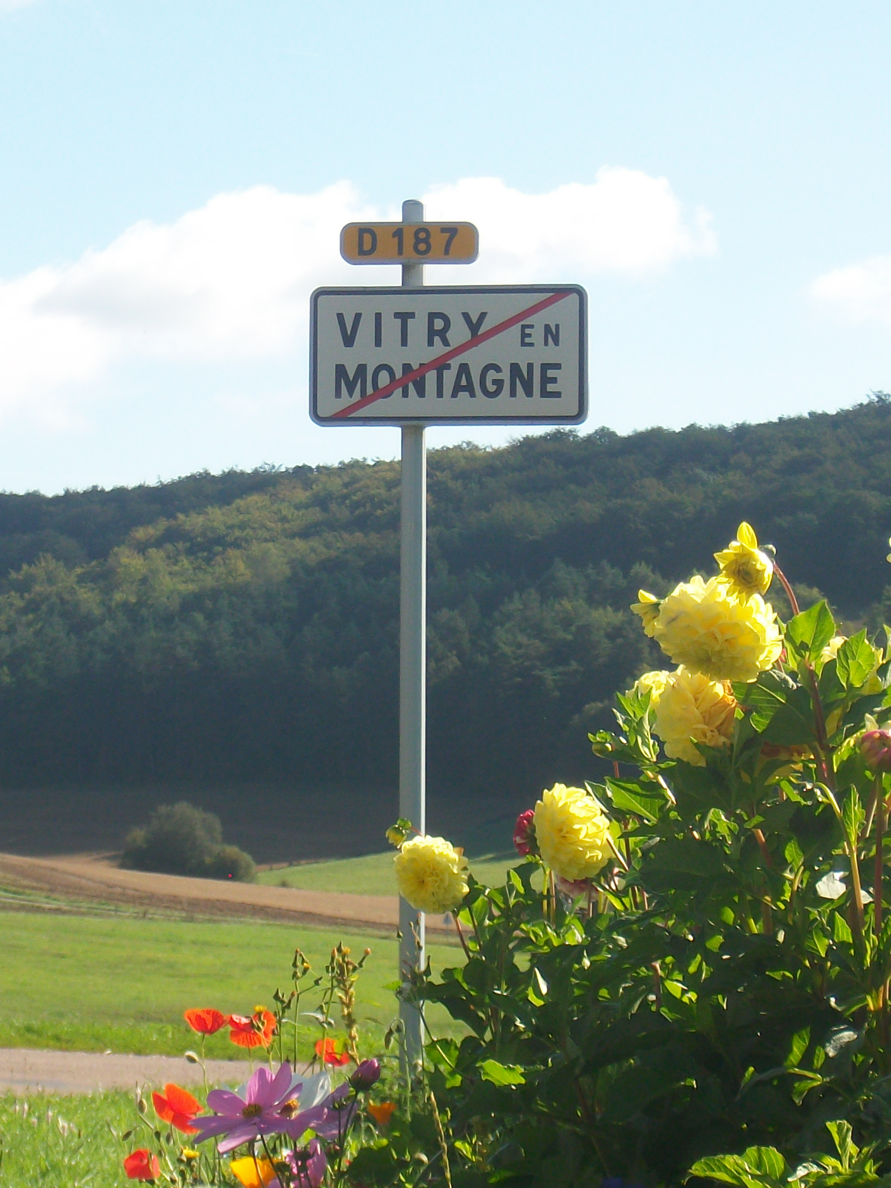 Sortie de Vitry en Montagne (Côté Chameroy).